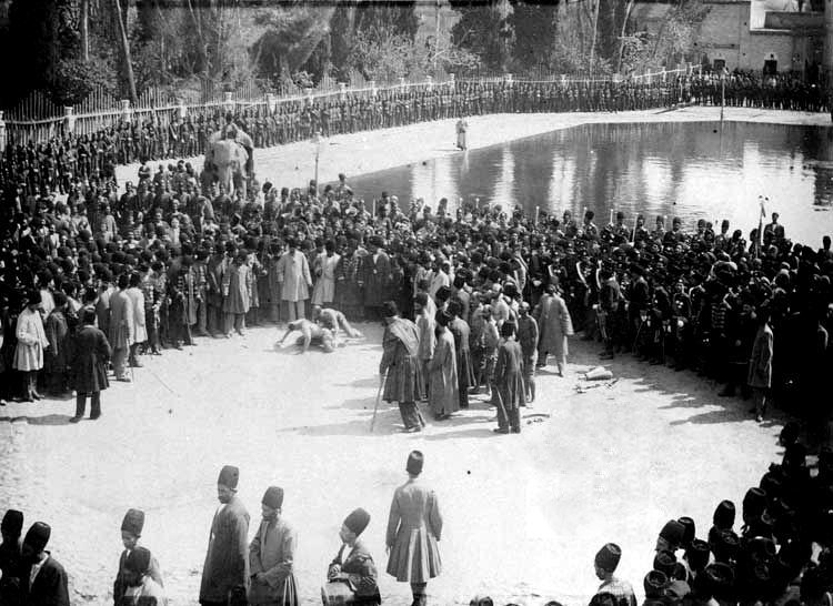 گردهمایی مردم برای تماشاي کشتي پهلواني در دوره ناصرالدین شاه در ميدان ارک تهران